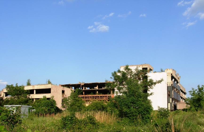 Srušena zgrada Radio Televizije Vojvodine na Mišeluku kod Novog Sada